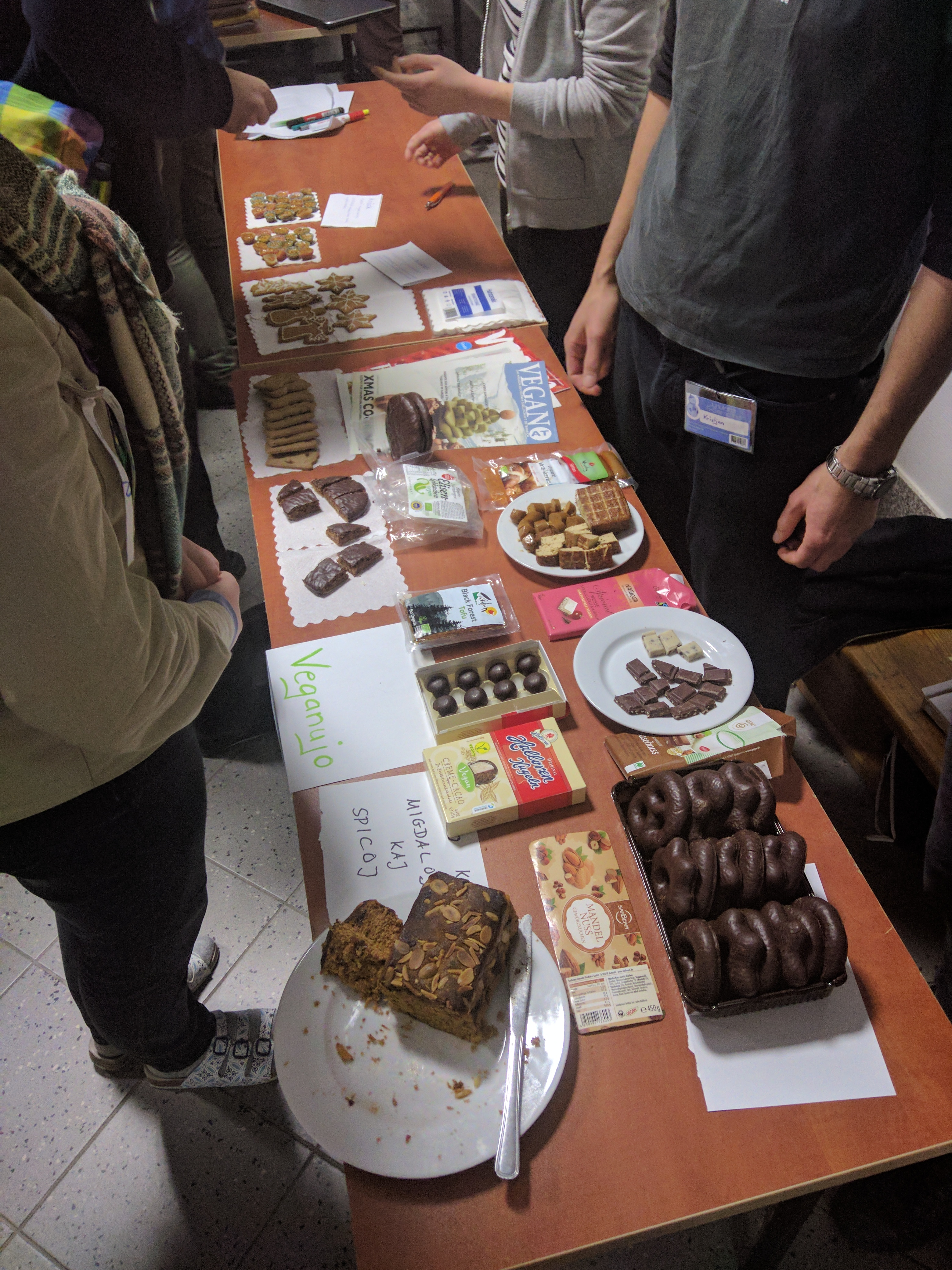 Veganujo